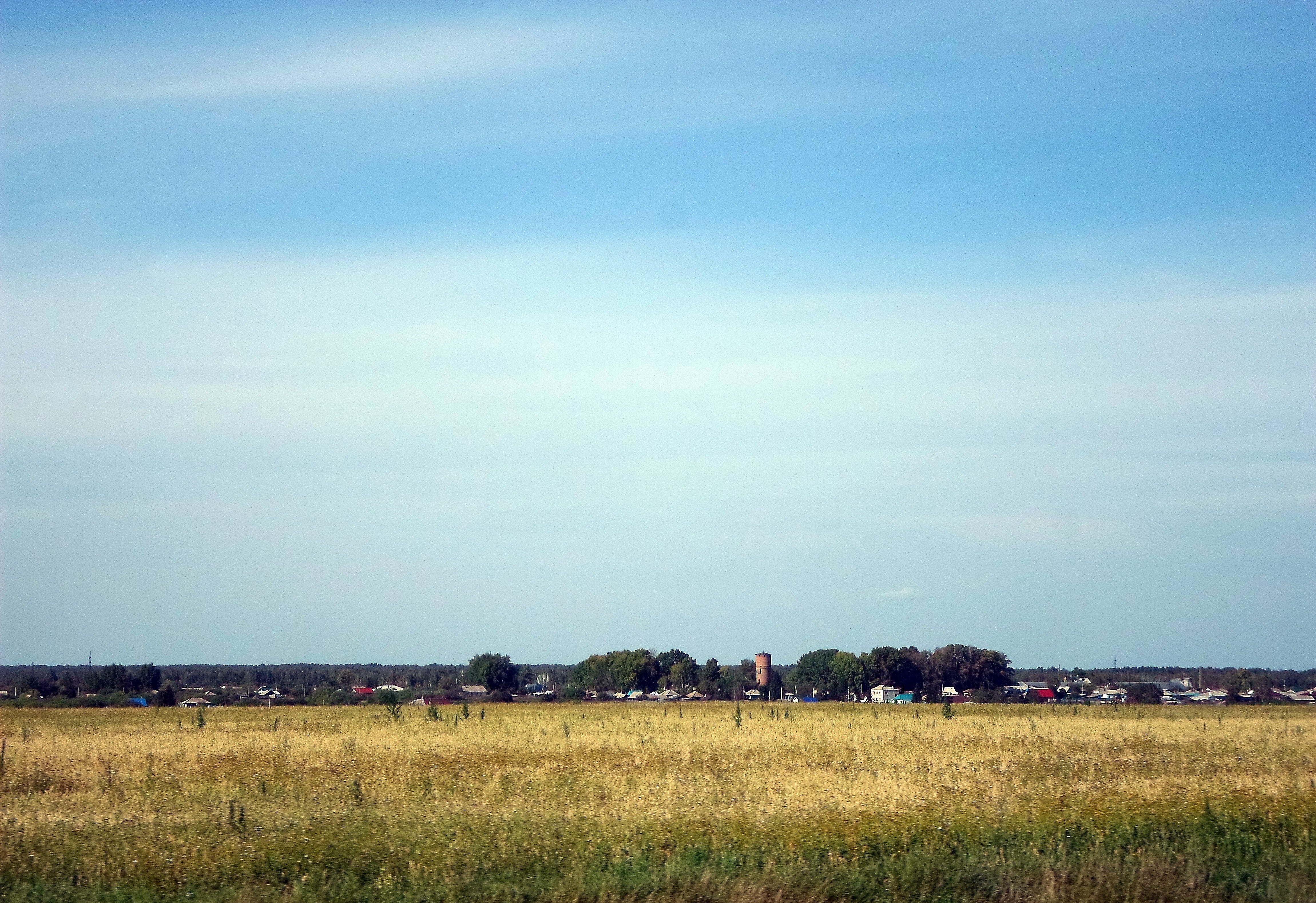 Село Критово. Боготольский район Красноярского края. Вид с федеральной автомагистрали Р255 "Сибирь".